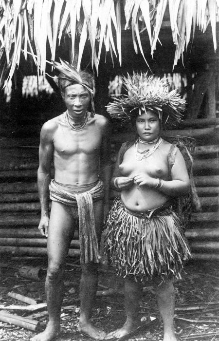 Repronegatief. Een echtpaar van de Mentawai-eilanden